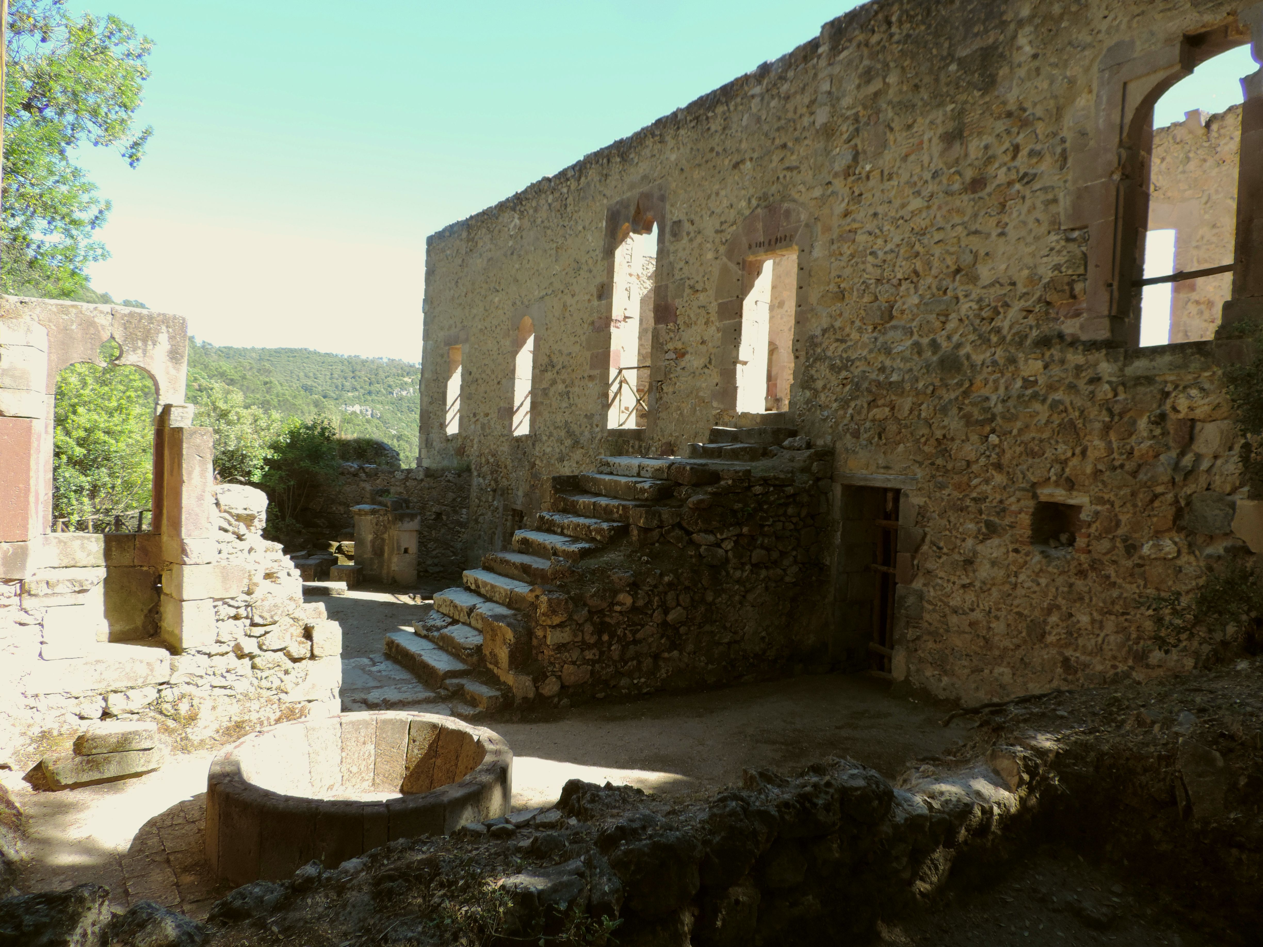 Museo delle Statue Menhir - Palazzo Aymerich This is a photo of a monument which is part of cultural heritage of Italy.